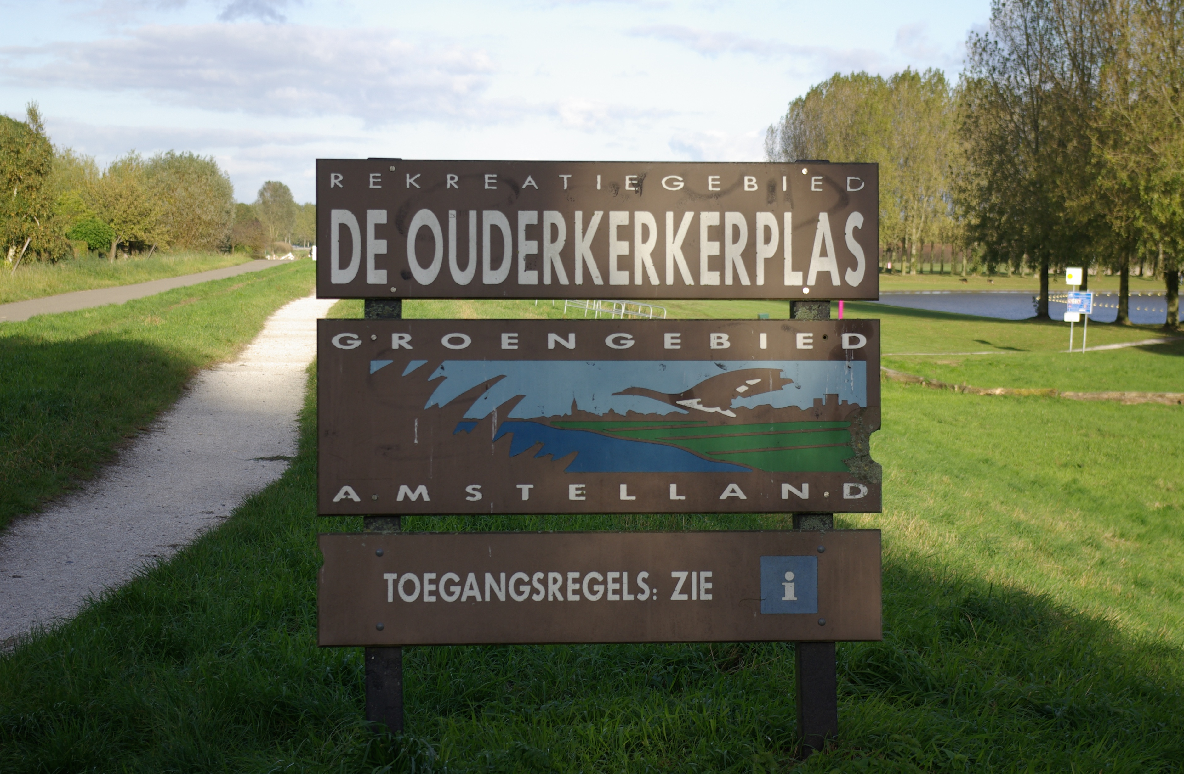 Hinweisschild der Kooperationsgemeinschaft Groengebied Amstelland am See Ouderkerkerplas bei Ouderkerk aan de Amstel